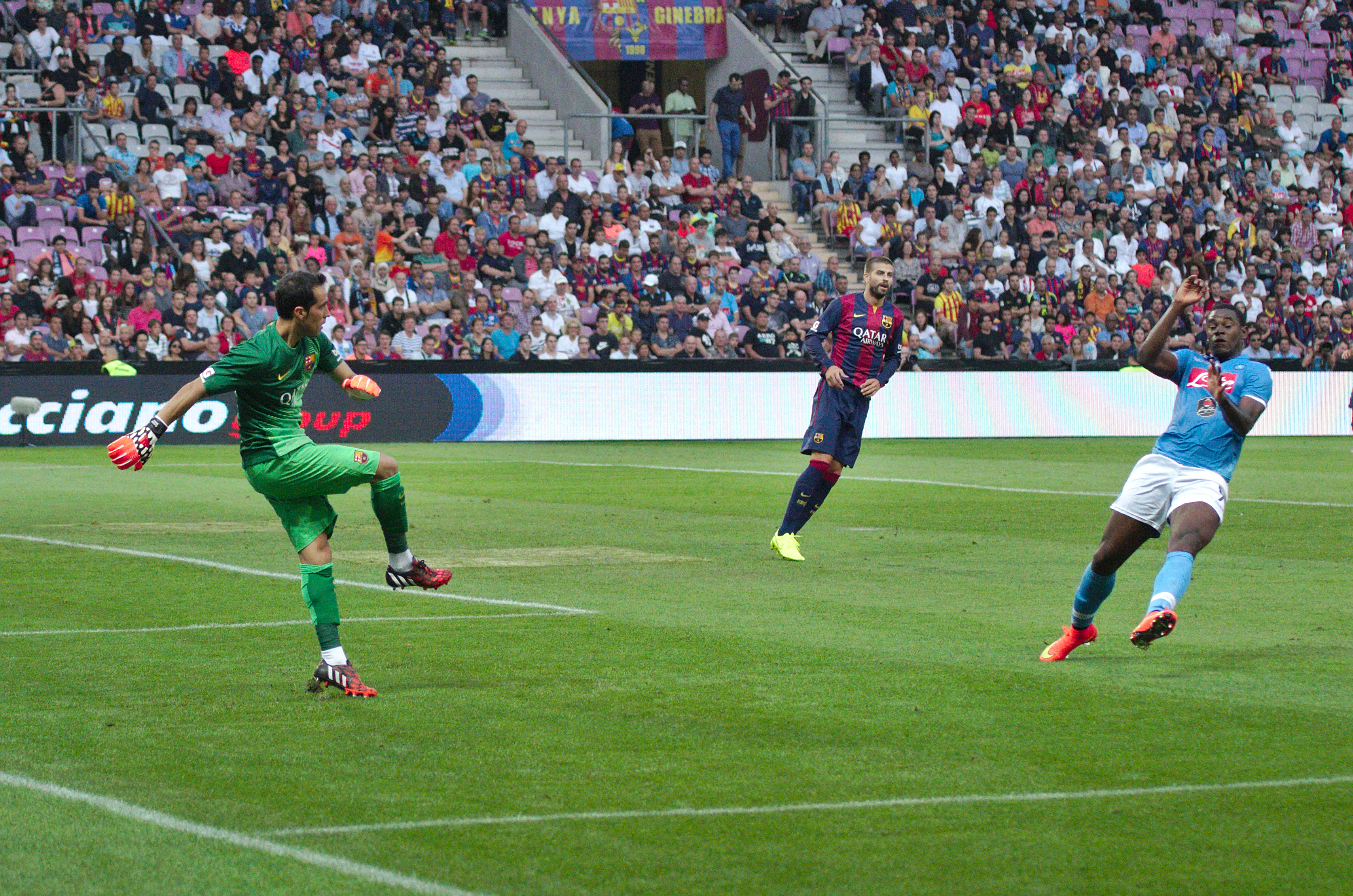 Barça - Napoli - 20140806